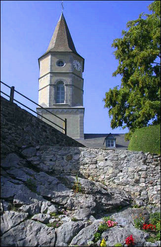 Église de Castet, village situé en Vallée d'Ossau (64)